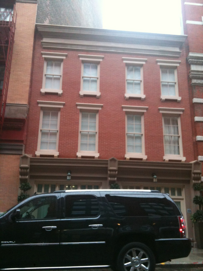 La résidence surveillée où habitait Dominique Strauss-Kahn. 153 Franklin Street